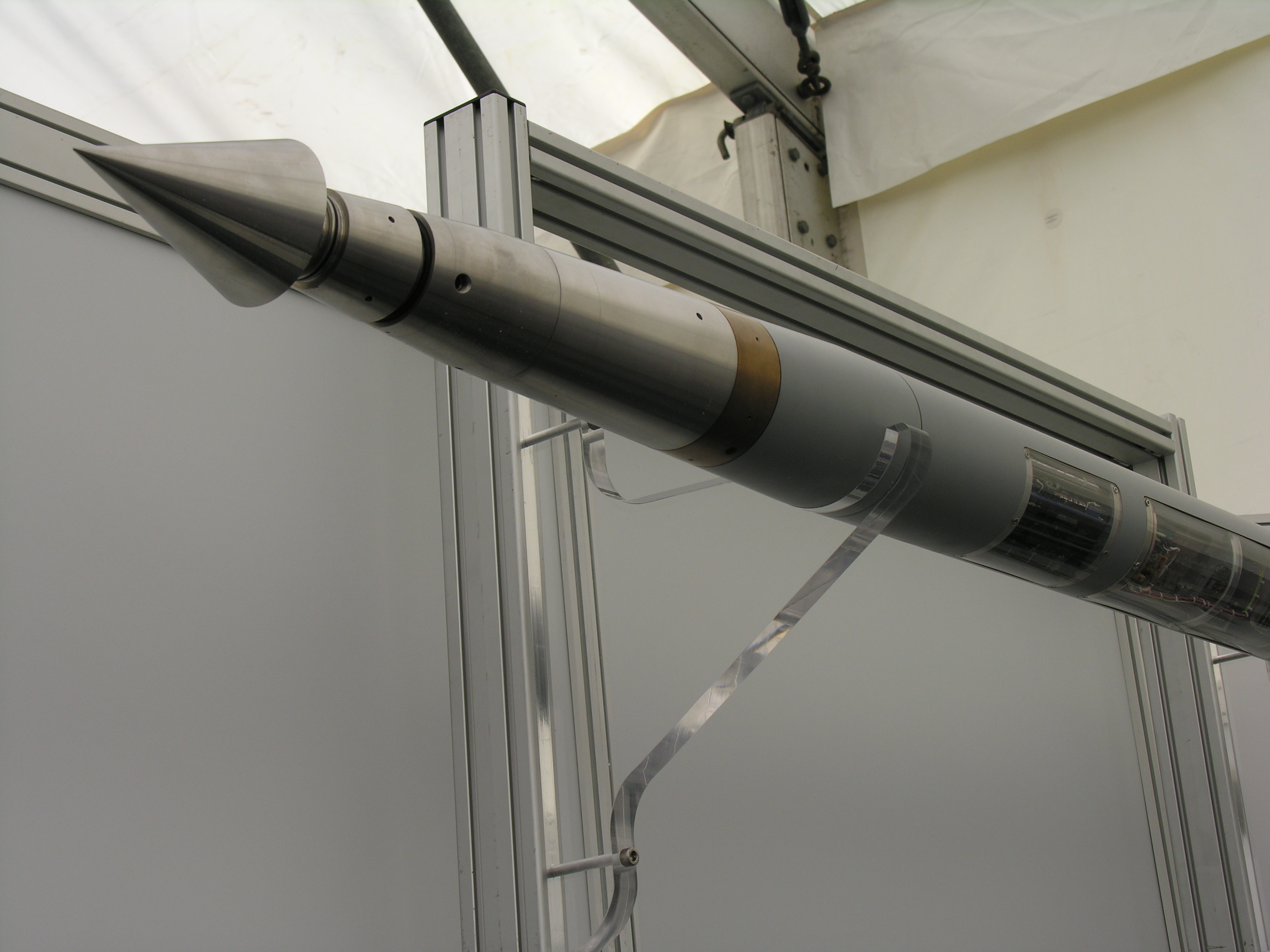 Подводная ракета Барракуда (Германия) на выставке TechDemo'08, 2008 год